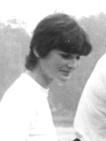 Nationalmannschaft, DDR, Achter ADN-ZB Mittelstädt 19.8.82 Berlin: Der DDR-Achter der Frauen macht sich startklar zu einer Trainingsfahrt in Vorbereitung auf die Ruder-Weltmeisterschaft in Luzern: Steuerfrau Kirsten Wenzel. Achtung! Bitte offizielle Nominierung am 20.8.82 beachten!